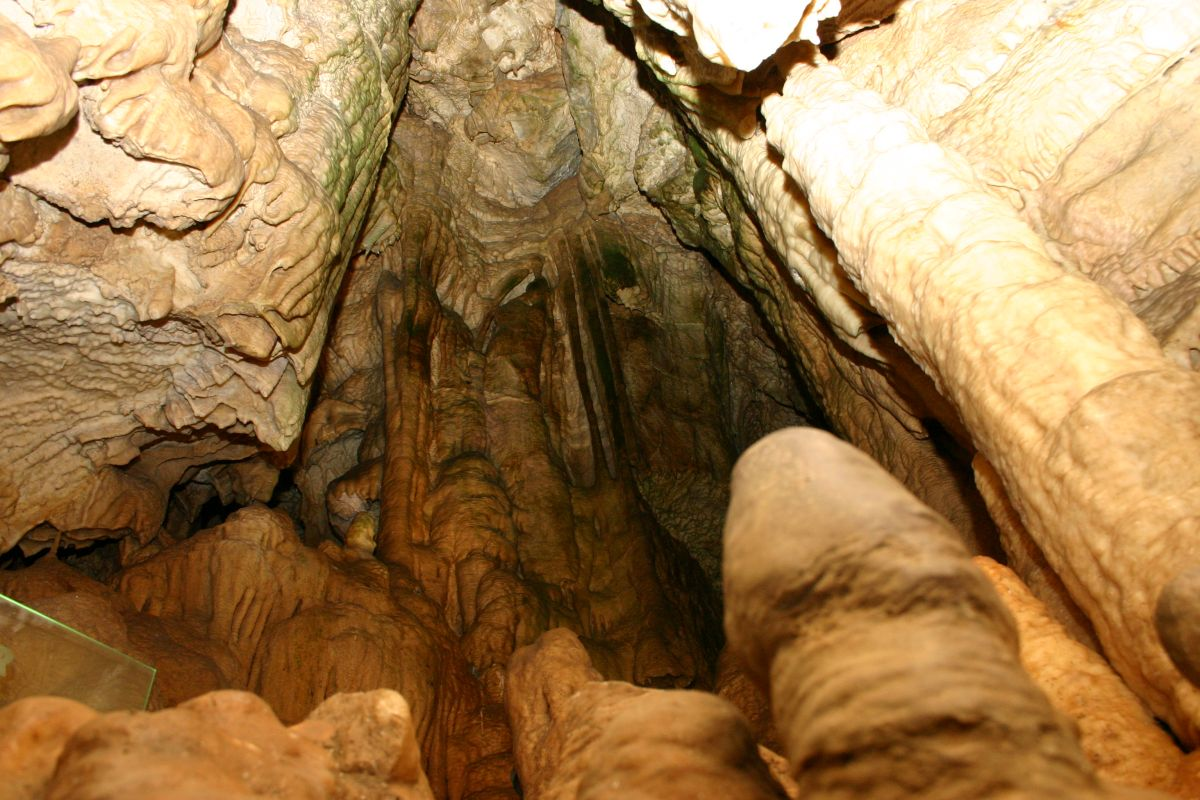 Binghöhle bei Streitberg